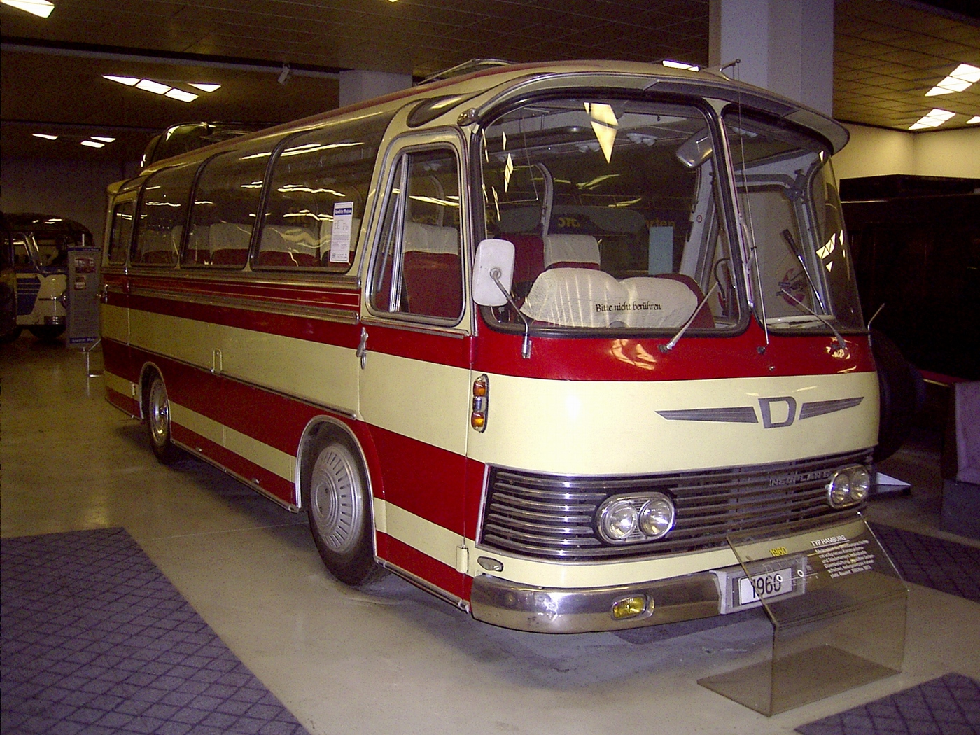 Neoplan Typ Hamburg im Neoplan-Museum Stuttgart-Möhringen fotografiert von Tilius 5.1.2006